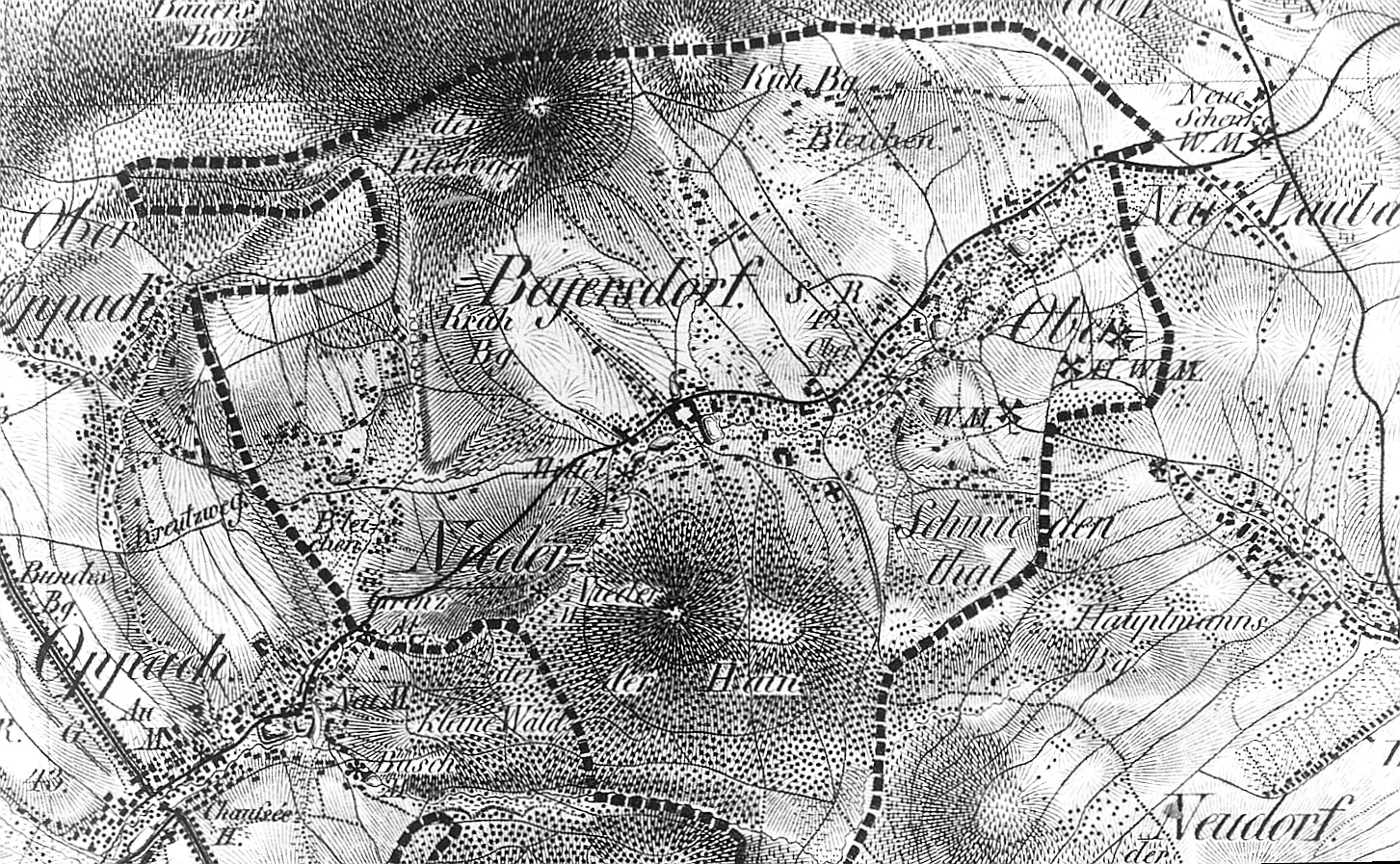 Original image description from the Deutsche Fotothek Beiersdorf. Oberreit, Sect. Stolpen, 1821/22